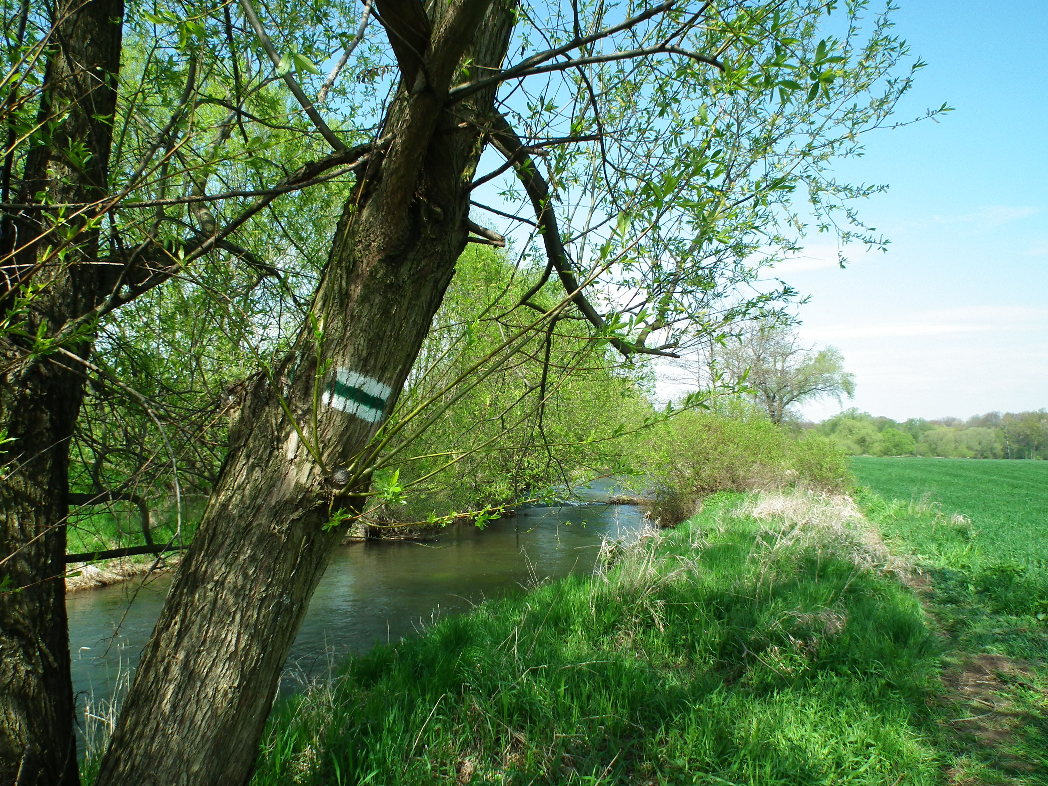 Szlak bitwy nad Kaczawą pomiędzy Krajowem, a Duninem.